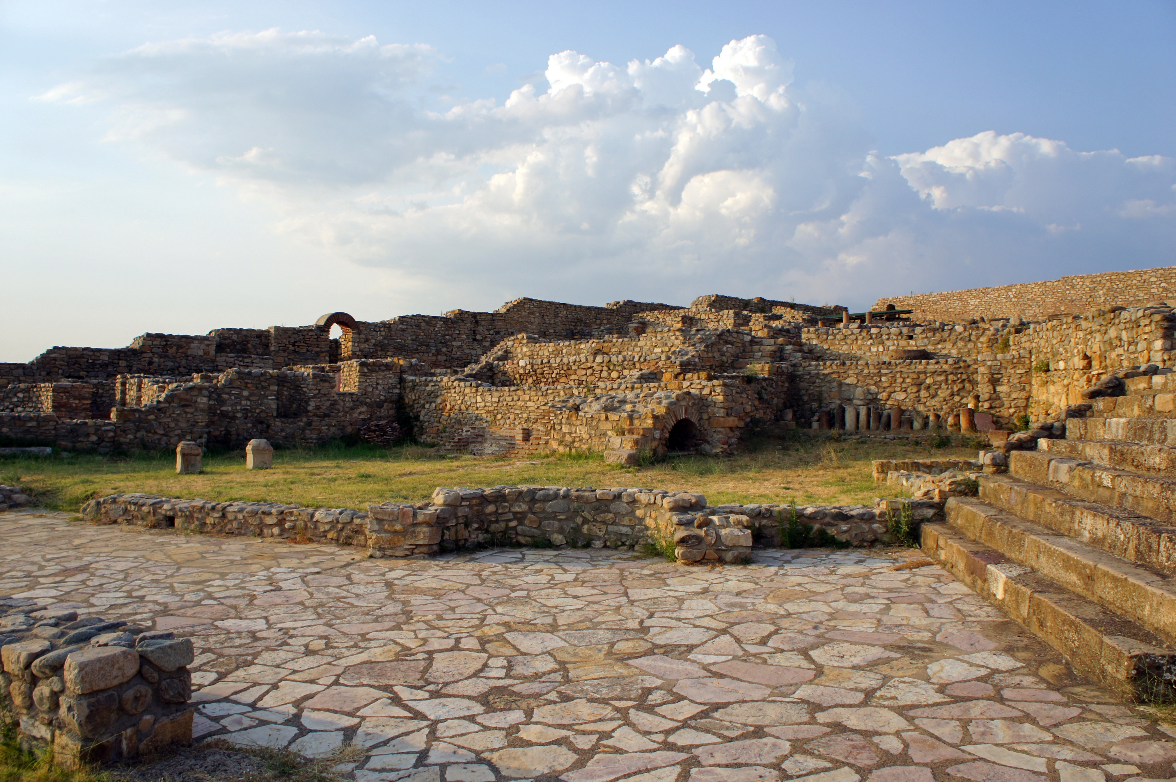 Изглед на улица во античкиот град Баргала денес